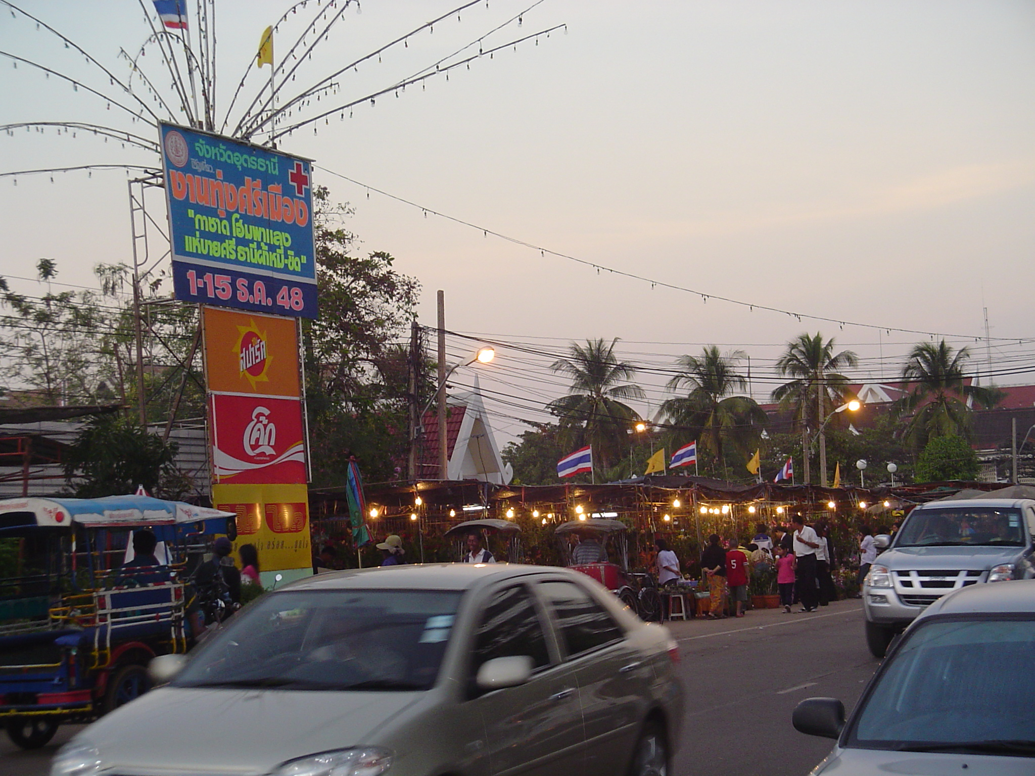 Удон-ТханиУдон-Тхани вид города